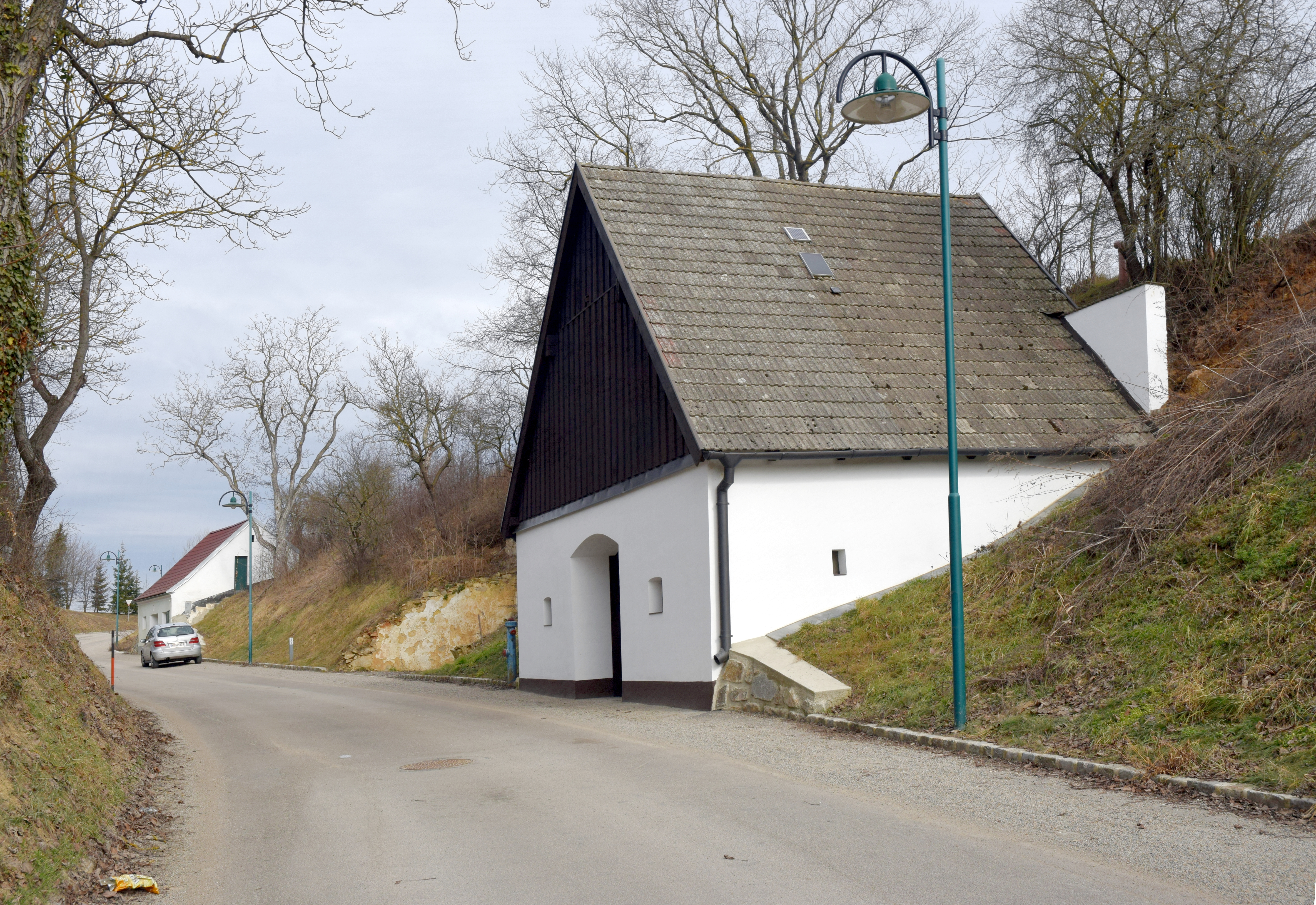 Kellergasse Missingdorfer Straße in der KG Kattau in Meiseldorf